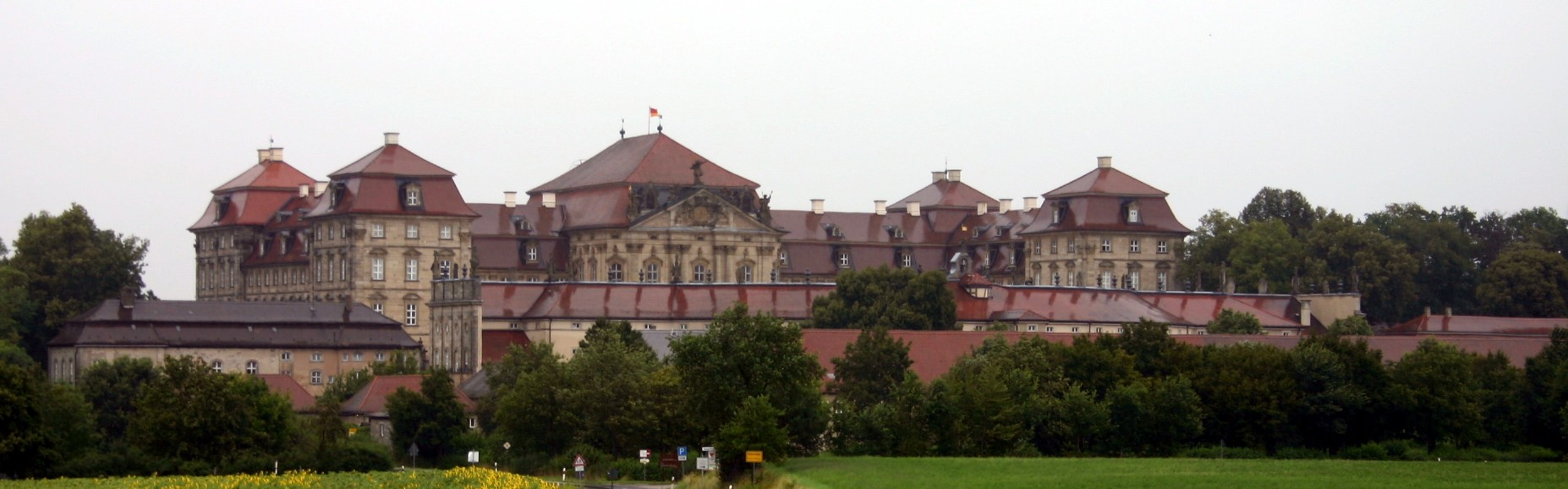 Schloss Weißenstein vom Süden